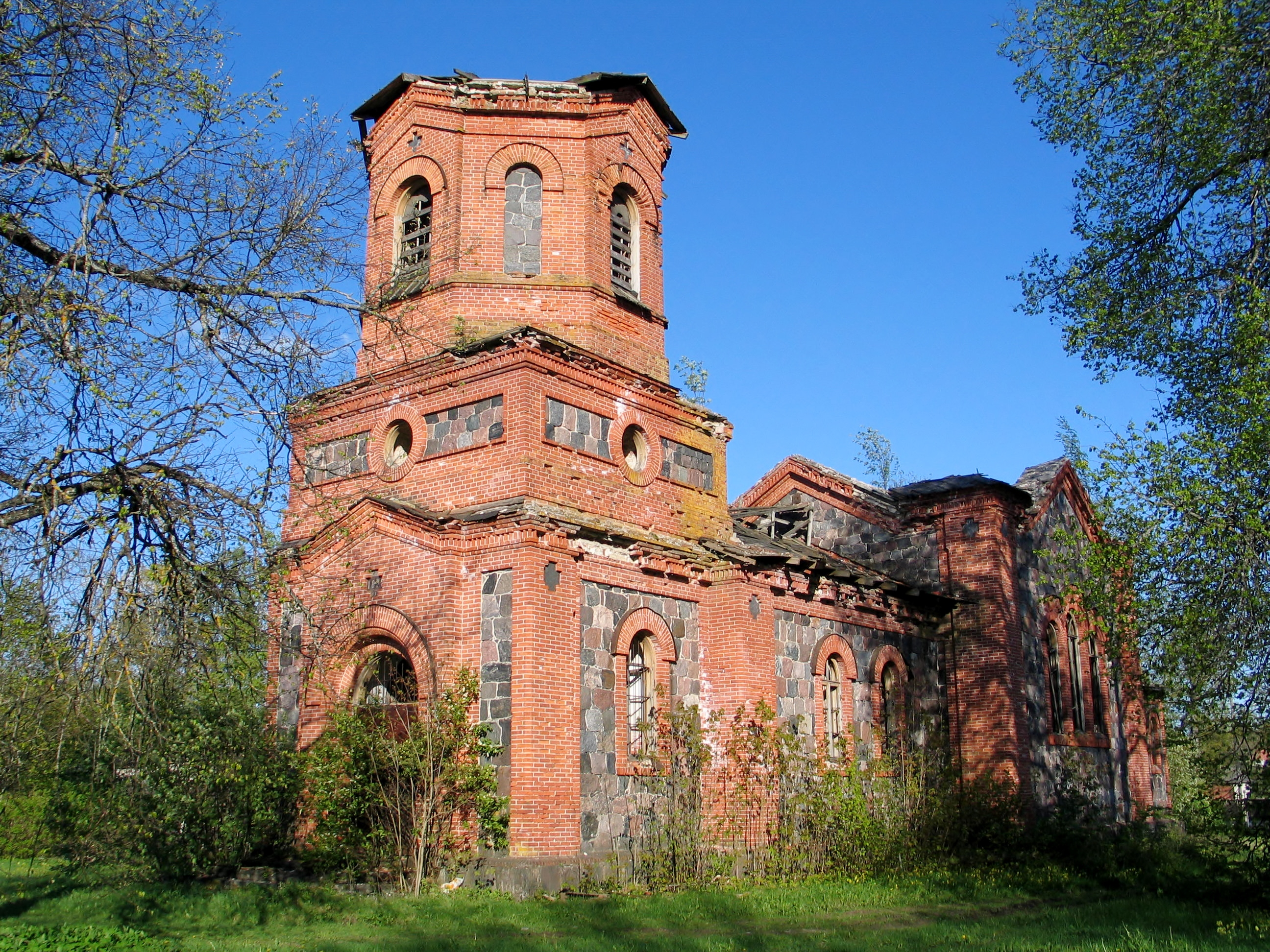 Märjamaa õigeusu kirik